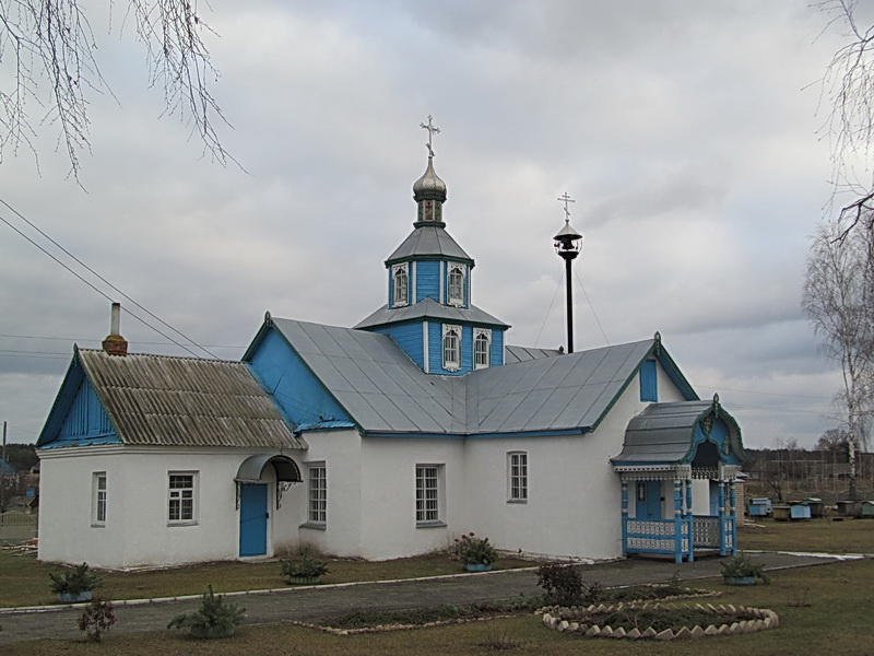 Таль. Новая царква